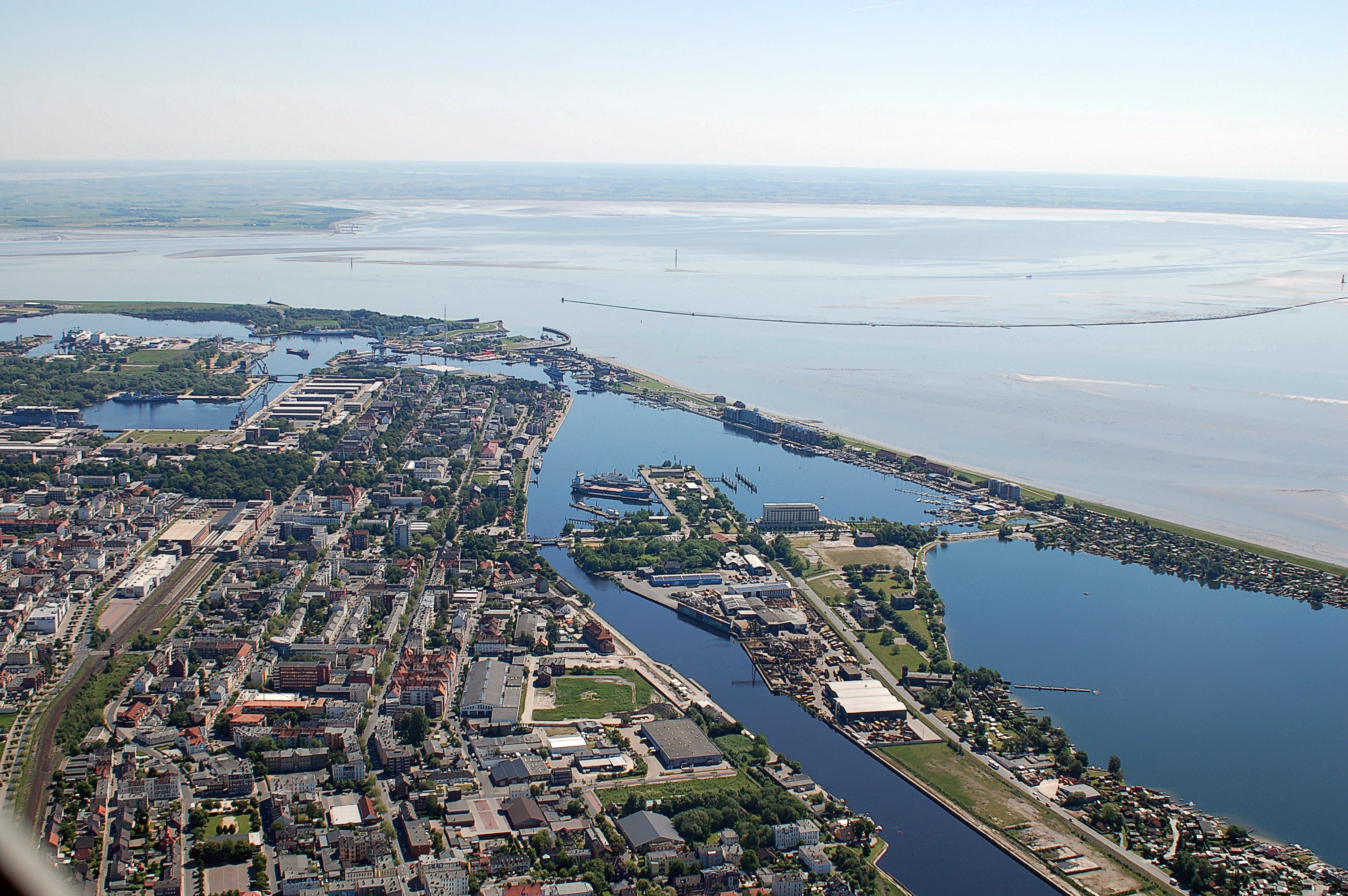 Luftbilder von der Nordseeküste 2012-05